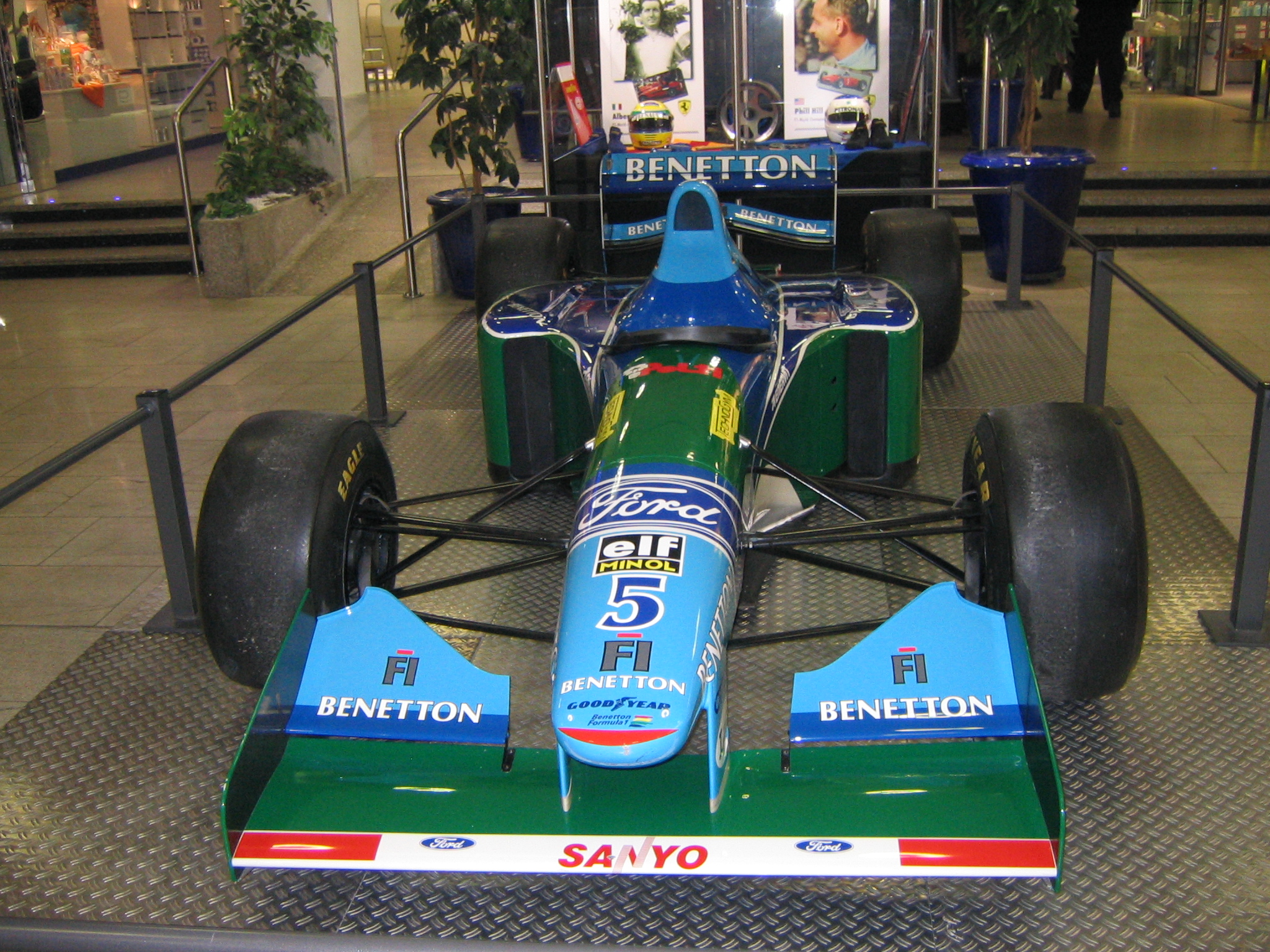 Benetton B194 Saison 1994 Ford V 10 Motor ca. 730 PS Leistung 350 km/h Topspeed 650kg (inkl. Fahrer) gefahren von Michael Schumacher